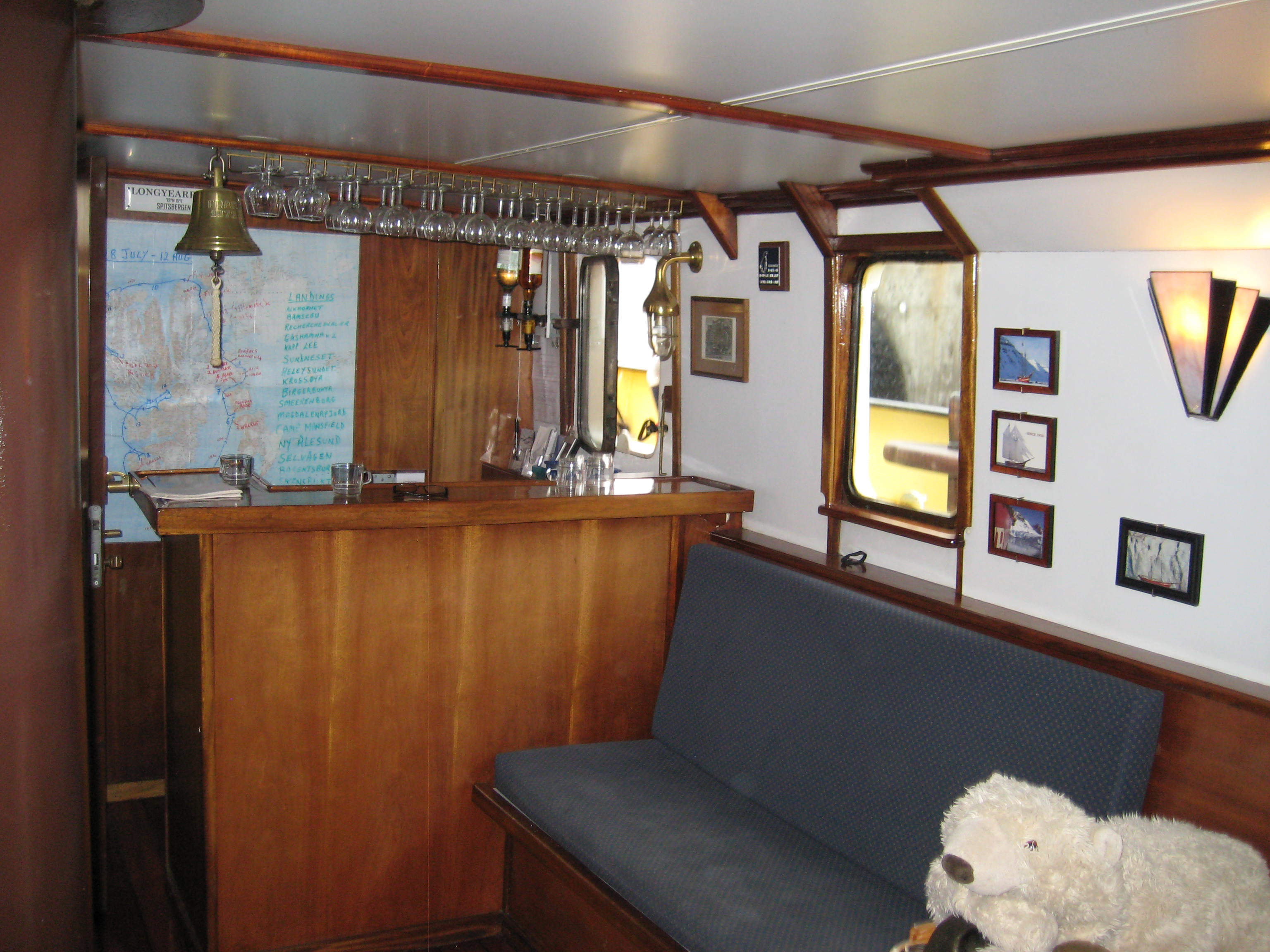 Deckhouse of schooner Noorderlicht.